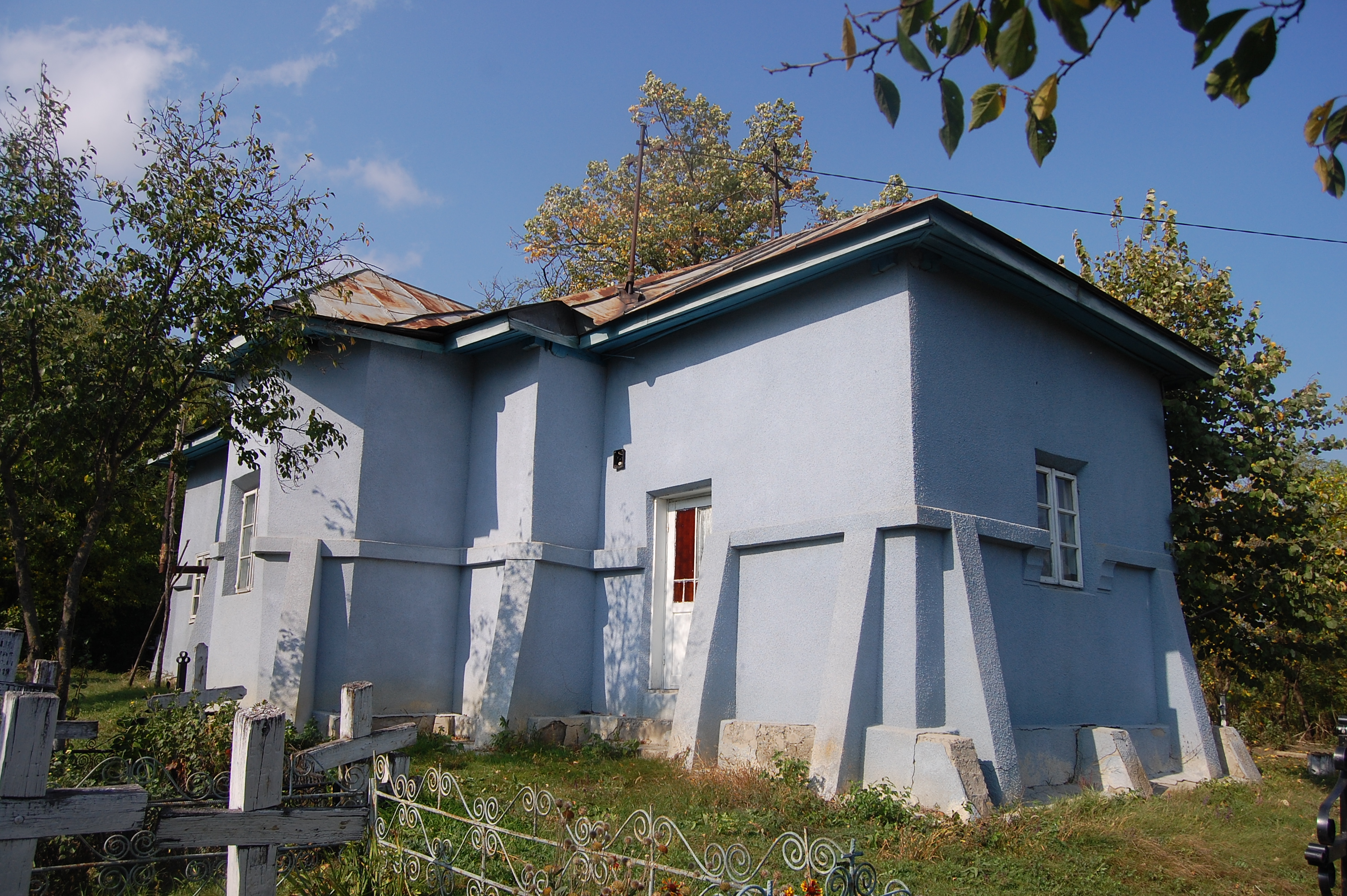 Biserica "Sf. Gheorghe" din Fichiteşti, judeţul Bacău